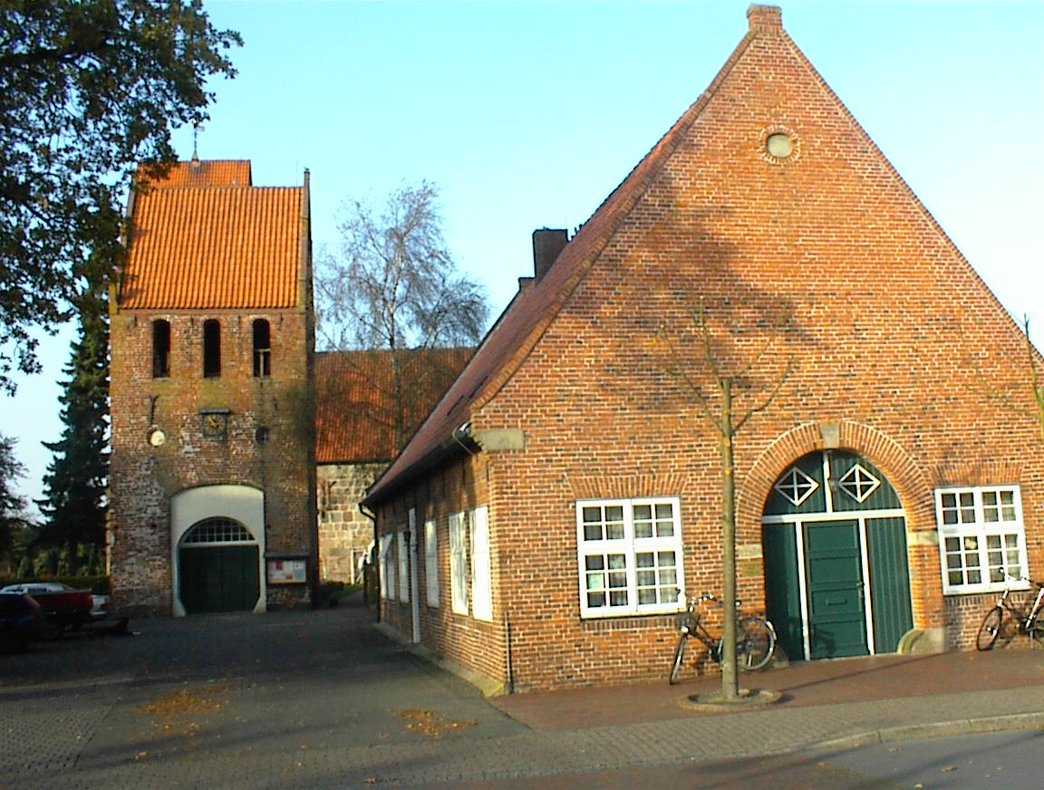 Man sieht von Richtung KirchstraÃŸe aus den Glockenturm und dahinter die ev.Luth. St.Johannes Kirche von 1057. Im Vordergrund steht das KirchenbÃ¼ro.